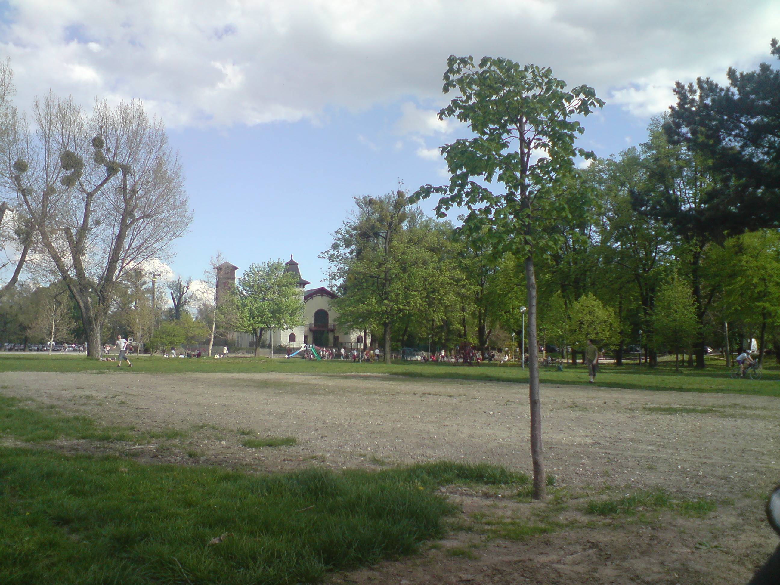 Tyršovo nábrežie po zrušení Lunaparku.